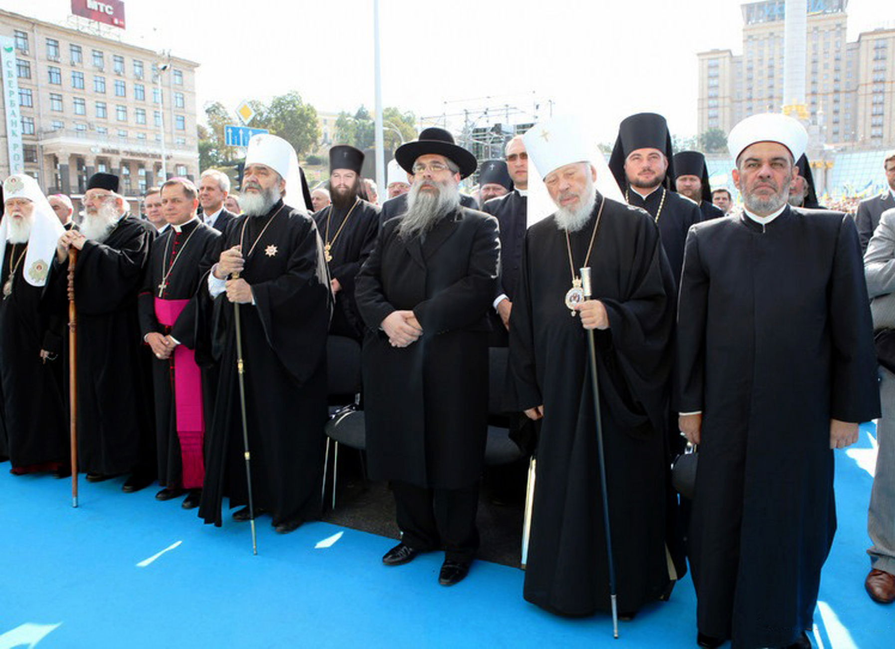 Святкування Дня незалежності України. Київ, Майдан Незалежності, 24 серпня 2010